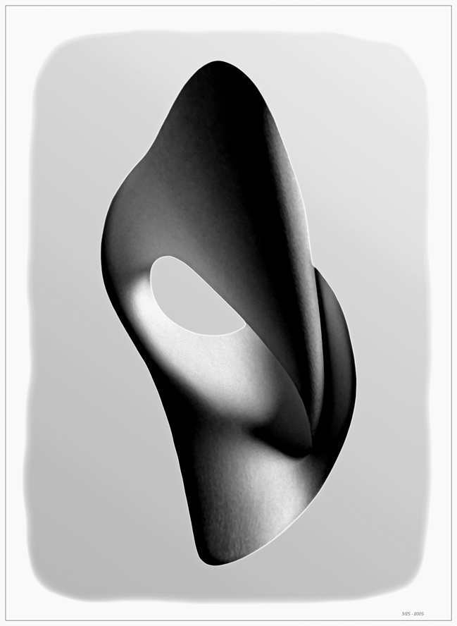 Embryo # 7. Från serien Embryos 2005.